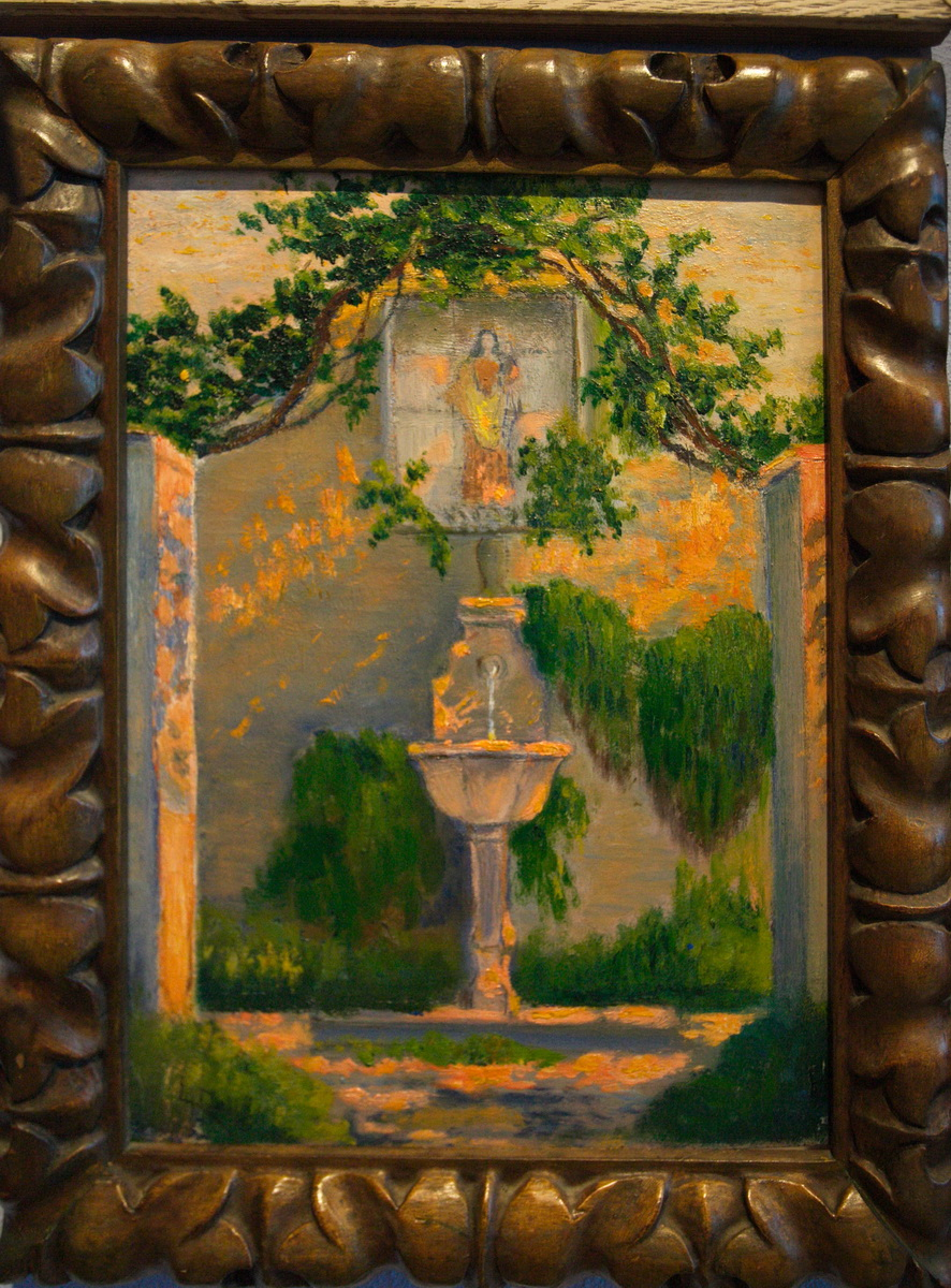 "La Font de la Verge (Xàtiva)", pintura de Lluïsa Denís, de 1922. Actualment al museu Cau Ferrat de Sitges